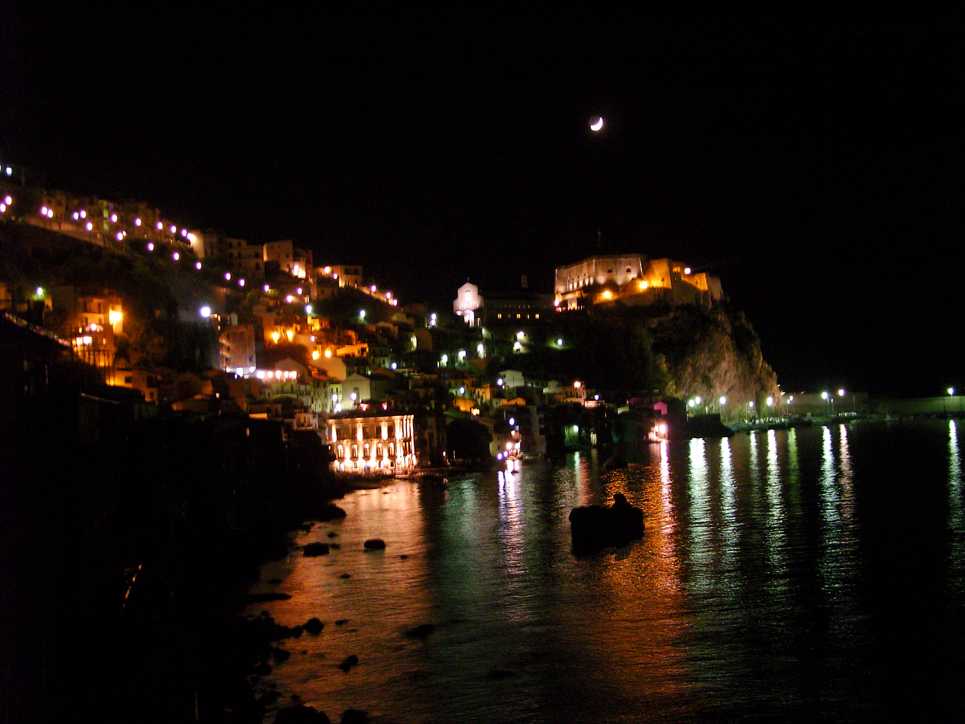 Porto di Scilla e Chianalea di notte